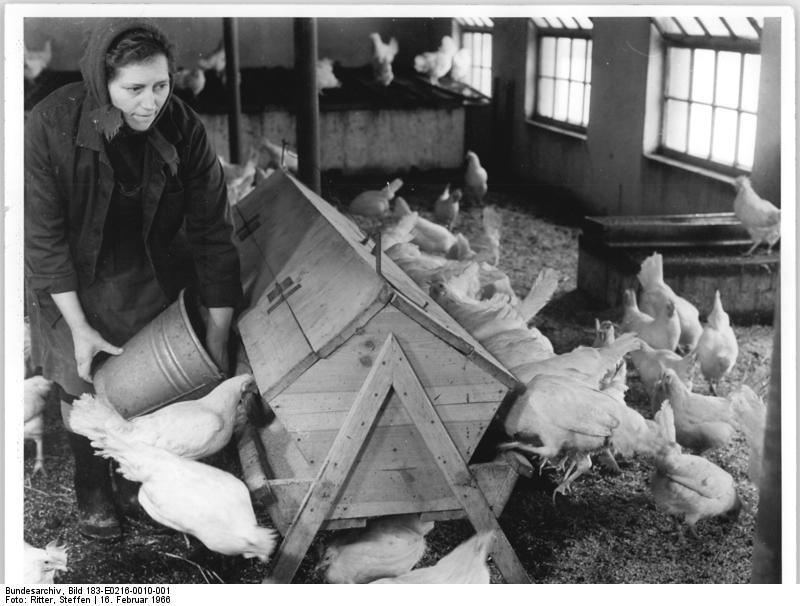 LPG Neitzendorf, Geflügelzuchtmeisterin Zentralbild Ritter 16.2.1966-Delegiert zum IX. Deutschen Bauernkongreß - Meister der Geflügelzucht ist die 38-jährige Christa Möhring, die die Genossenschaftsbauern der LPG Neitzendorf und darüber hinaus des Kreises Wolmirstedt auf dem IX. Deutschen Bauernkongreß in Berlin vertreten wird. In ihrer Genossenschaft ist sie für die im Aufbau befindliche Geflügelhaltung verantwortlich und betreut selbst 500 Legehennen und 1.000 Junghennen. Als Mitglied des LPG-Vorstandes und der Kreisbäuerinnenkommission der VdgB hat sich Christa Möhring stets mit großem Elan für die Belange der Frauen auf dem Lande eingesetzt. Wegen ihrer bisherigen vorbildlichen Arbeit wurde sie für die Mitarbeit im Zentralen Landwirtschaftsrat der DDR vorgeschlagen.